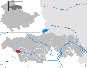 Holzsußra in Thuringia - Kyffhäuserkreis